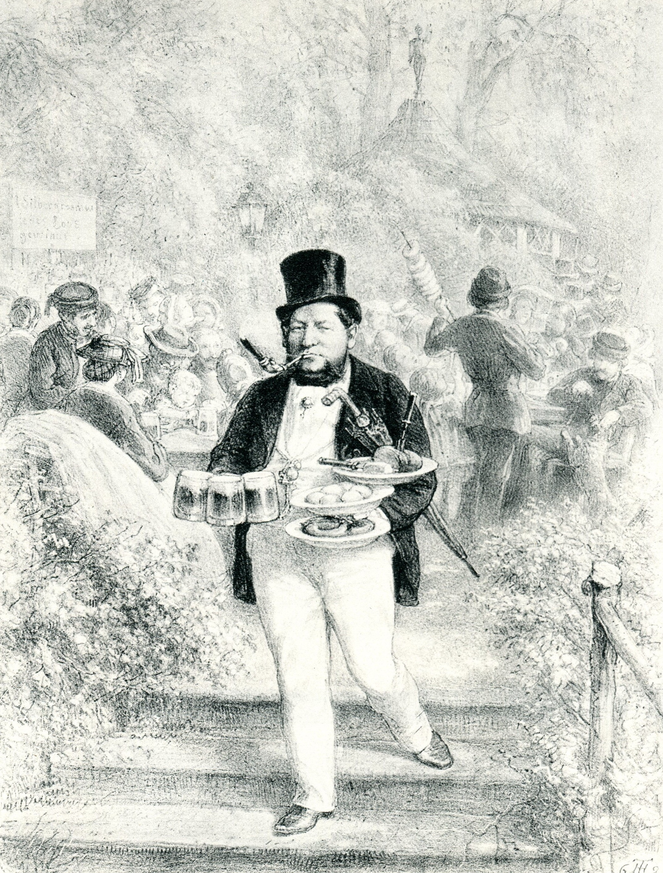 Genuss, Lithographie von Theodor Hosemann